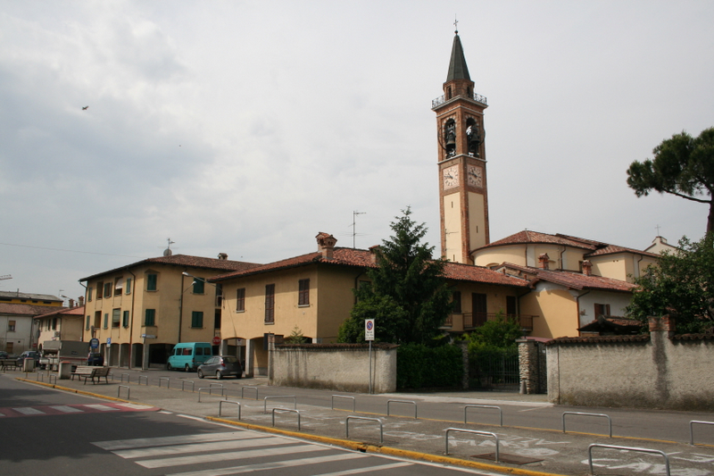 Pagazzano BG, Panorama.